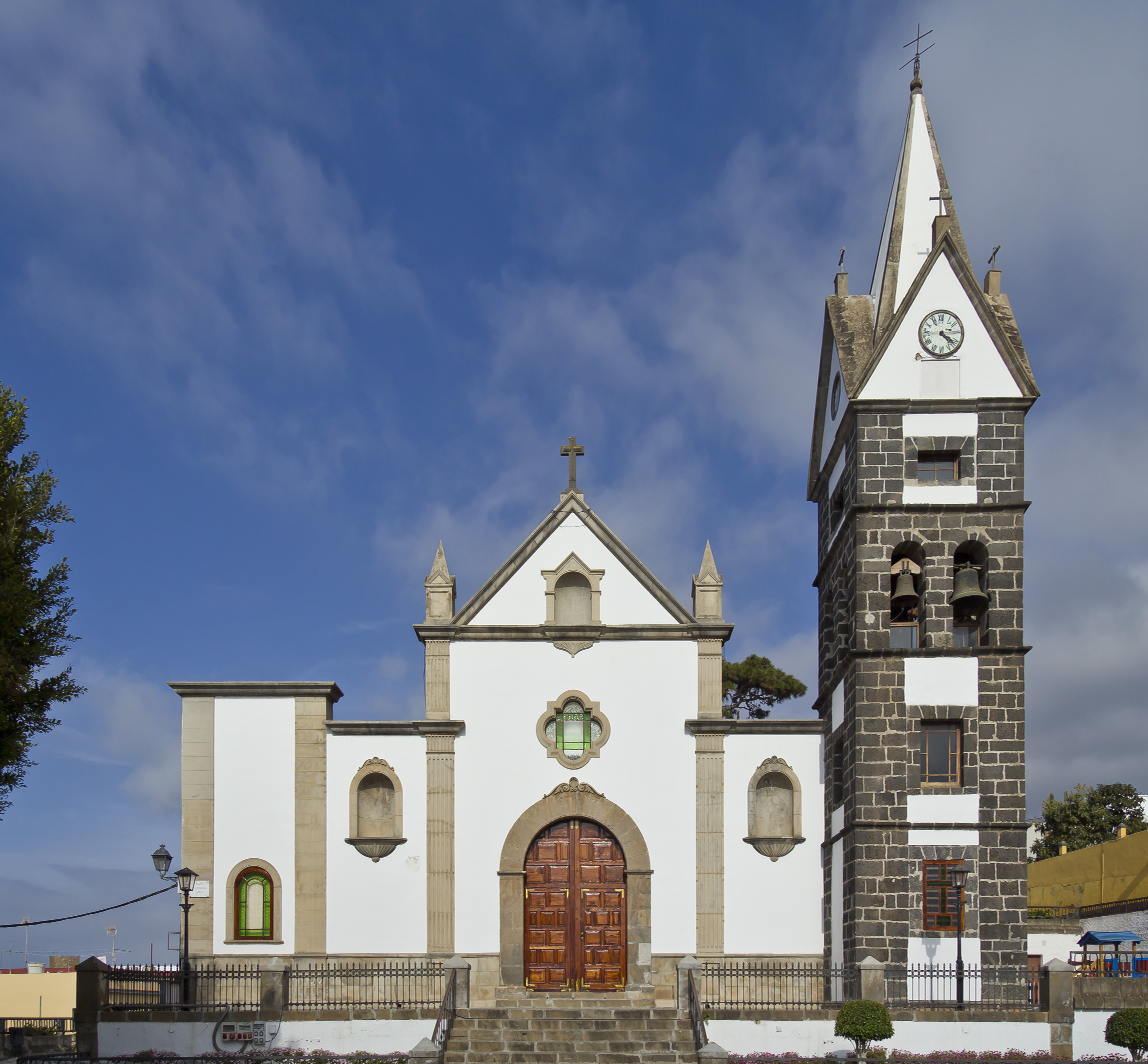 Iglesia de Nuestra Señora de la Victoria in La Victoria, Teneriffa